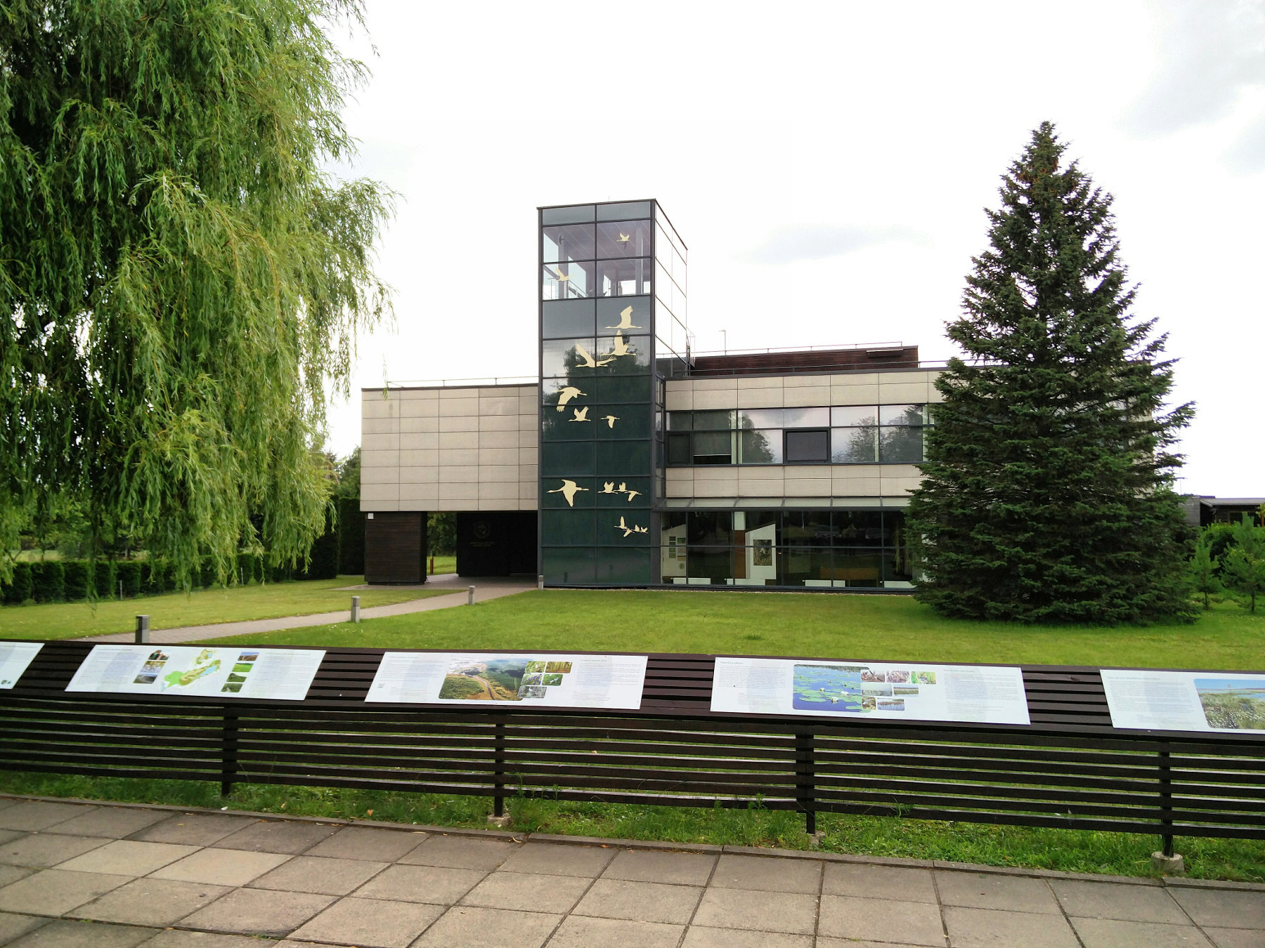 Žuvinto lankytojų centras